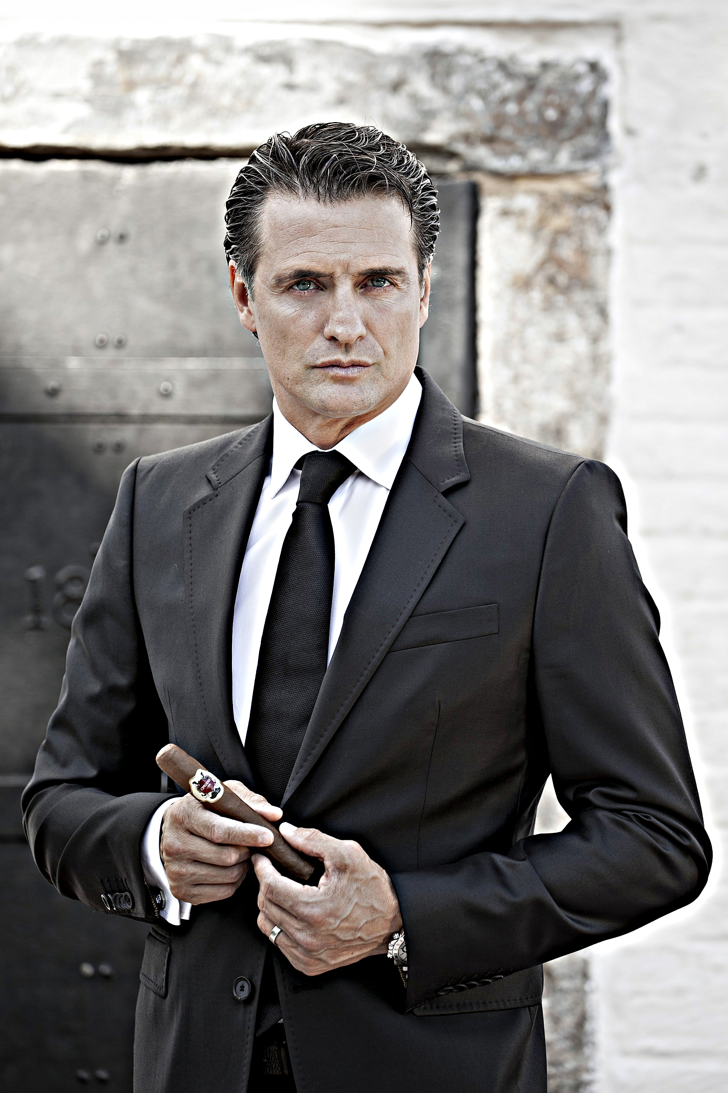 Fotografia tomada en el Faro de Key Biscayne